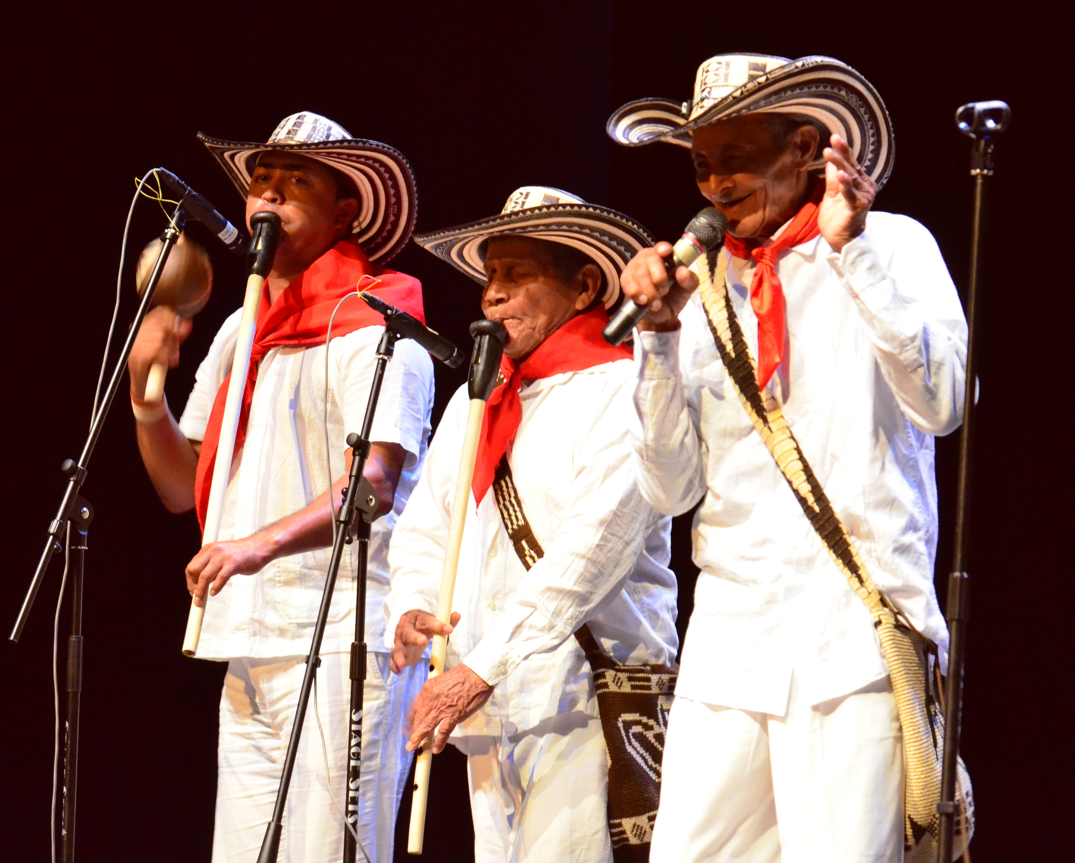 Los Gaiteros de San Jacinto